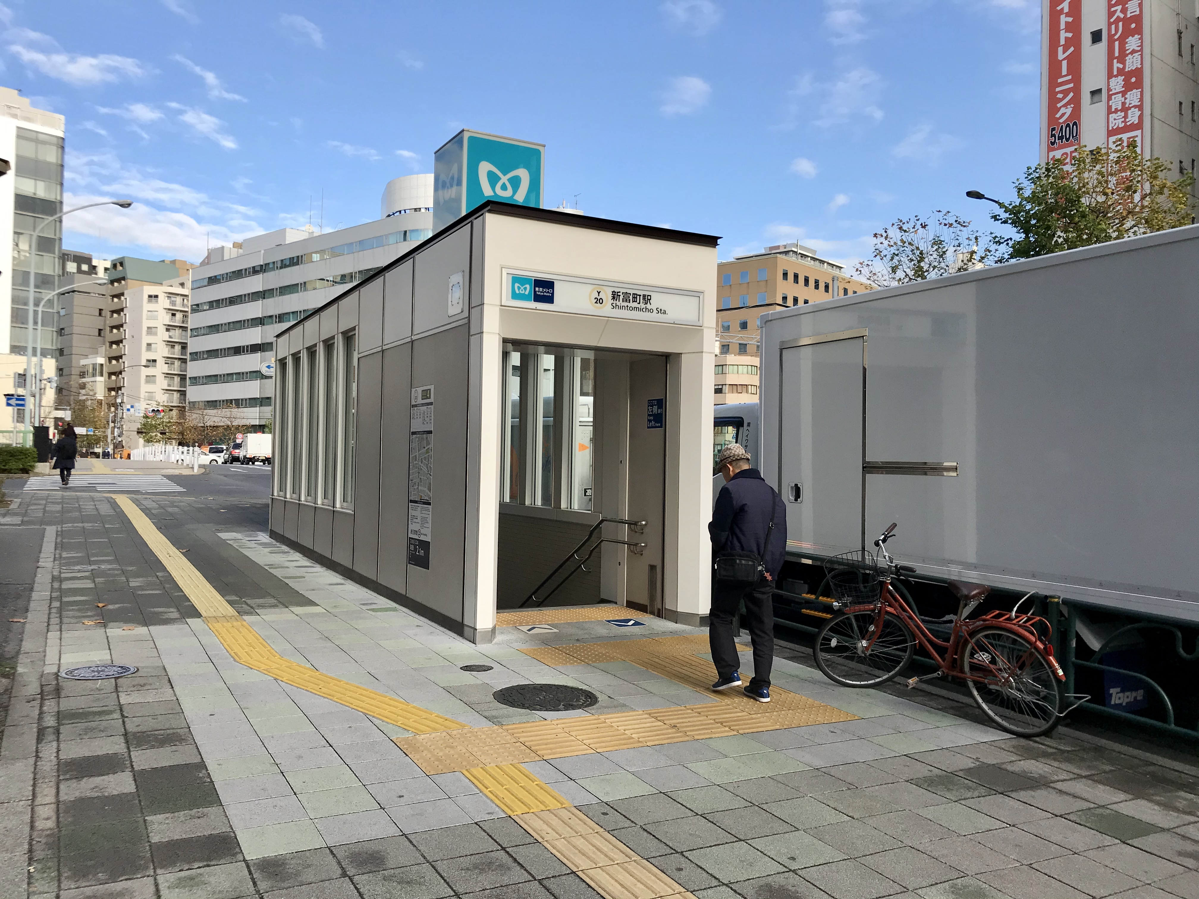 東京メトロ有楽町線新富町駅4番出入口（リニューアル後）